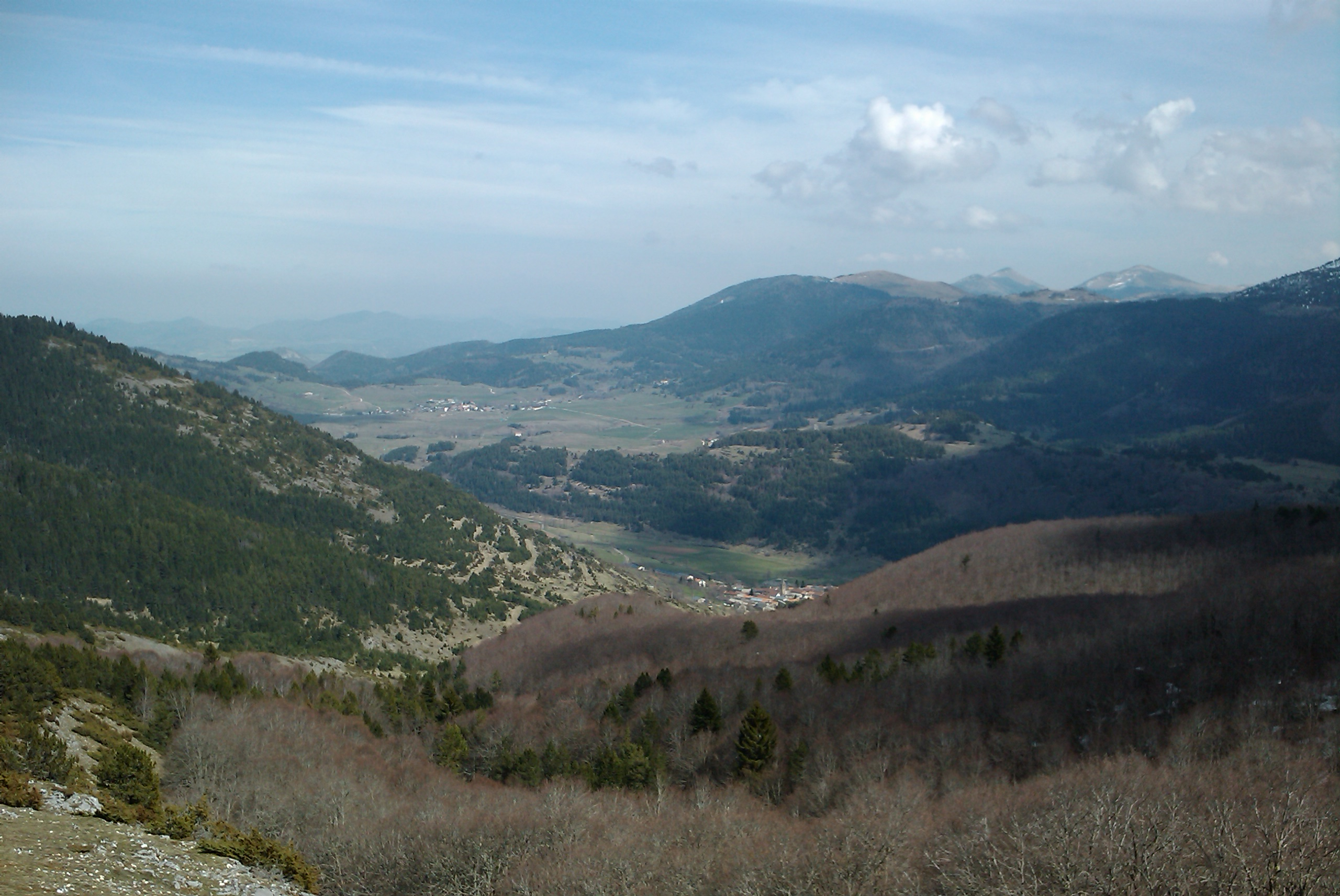 Vue depuis le plateau des Sept cases (Ariège) En premier plan, Prades Juste derrière en haut, Montaillou En fond, Camurac